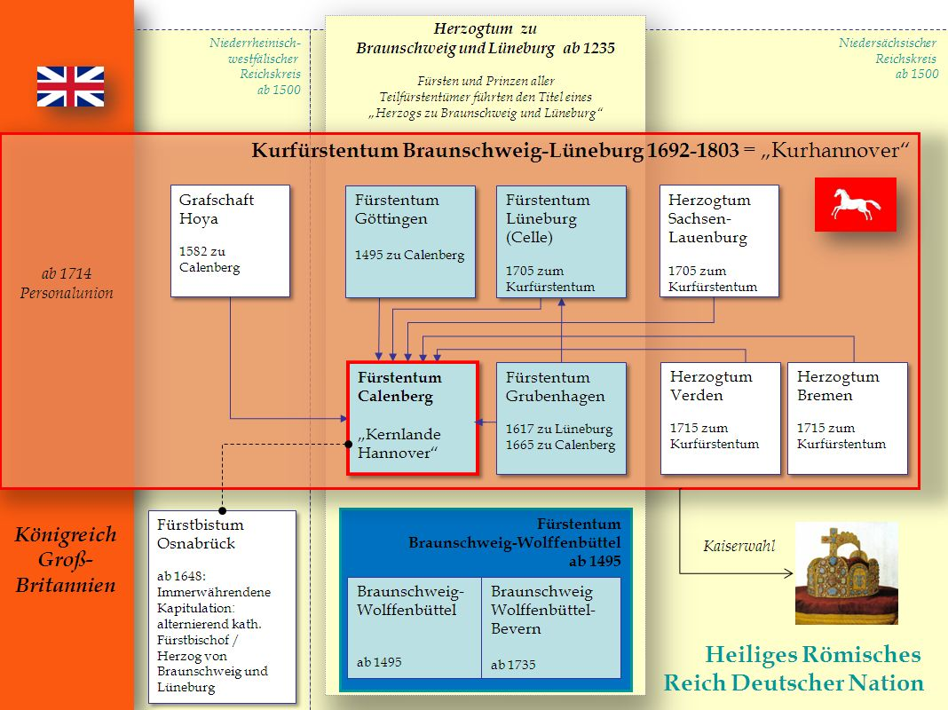 Aufbau des Kurfürstentums Braunschweig-Lüneburg